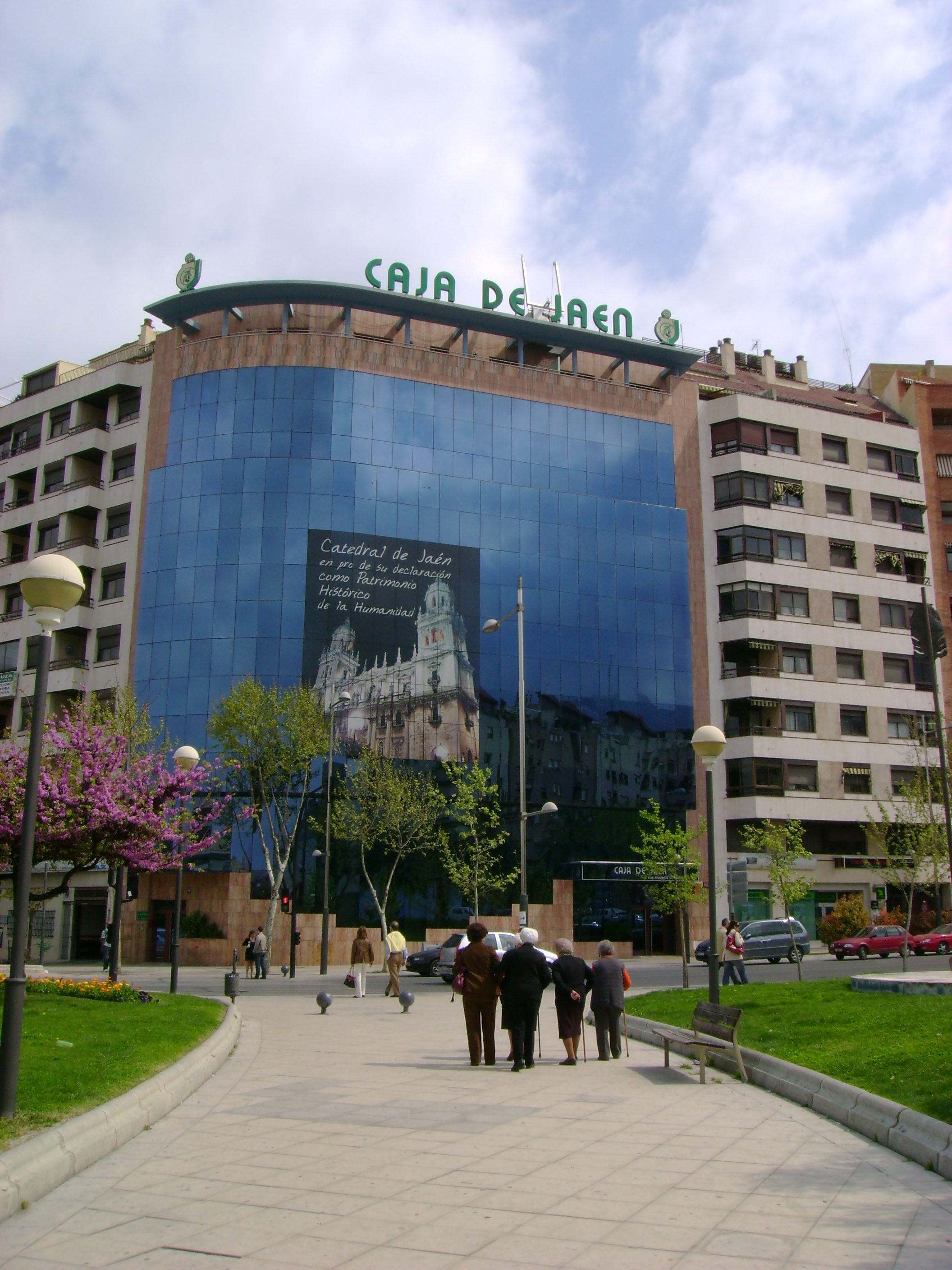 Edificio de la Caja de Jaén en la Plaza de Jaén por la Paz, Jaén.